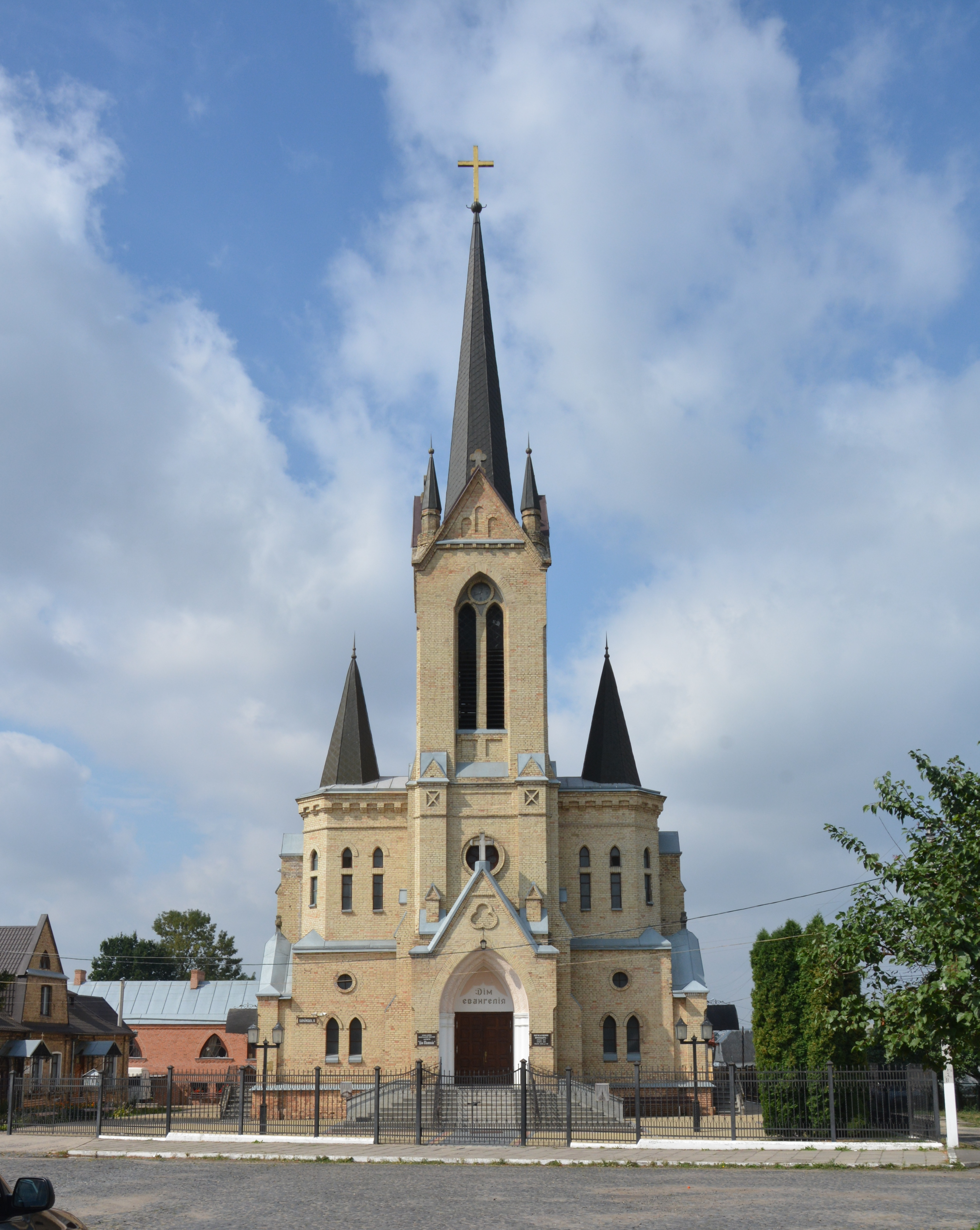 Кірха (мур.), Луцьк, вул. Караїмська, 16